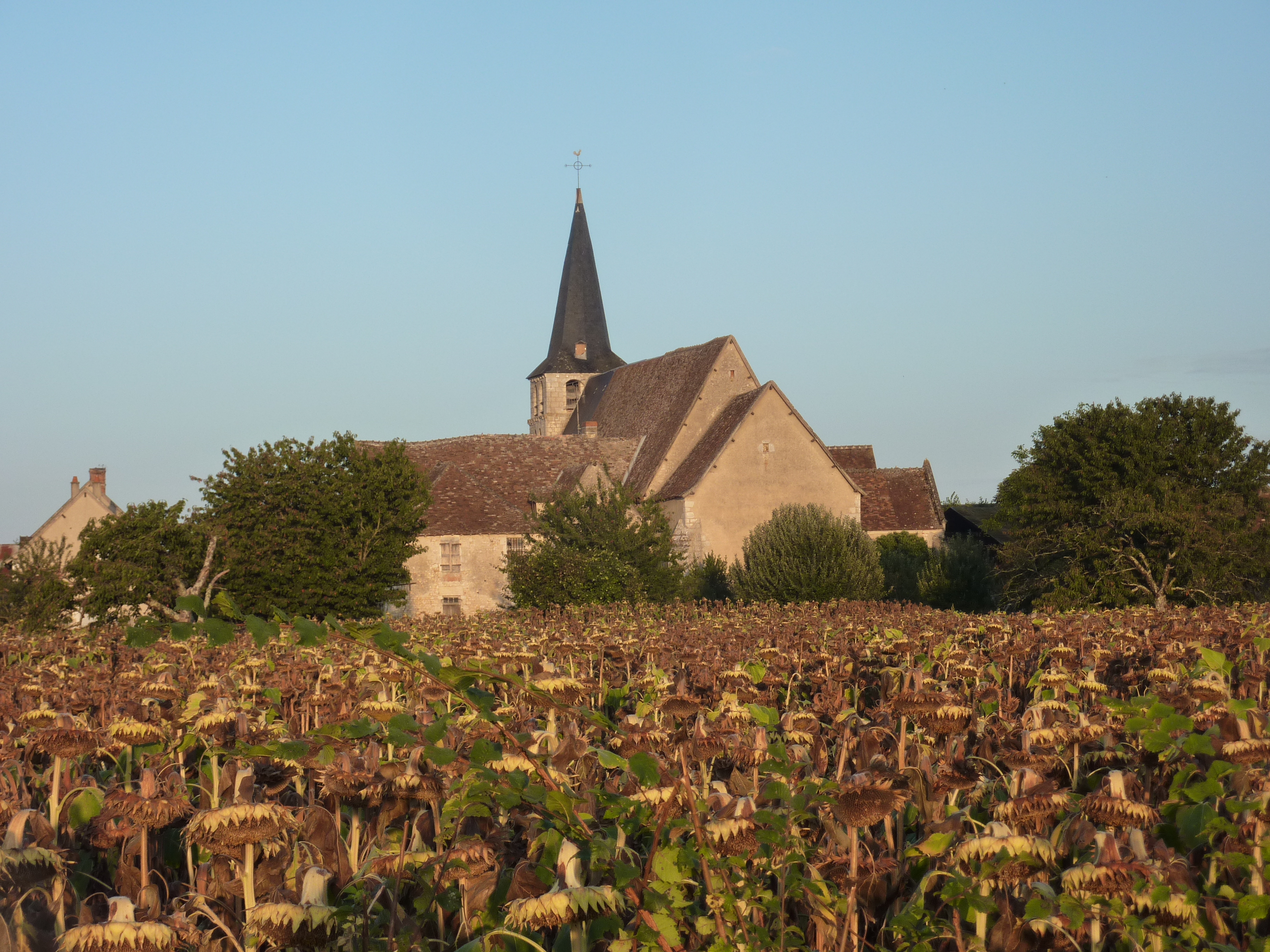 Saint Pierre de Pouligny, l'église est du XIIème siècle, et est connu par ses fresques du XVIème